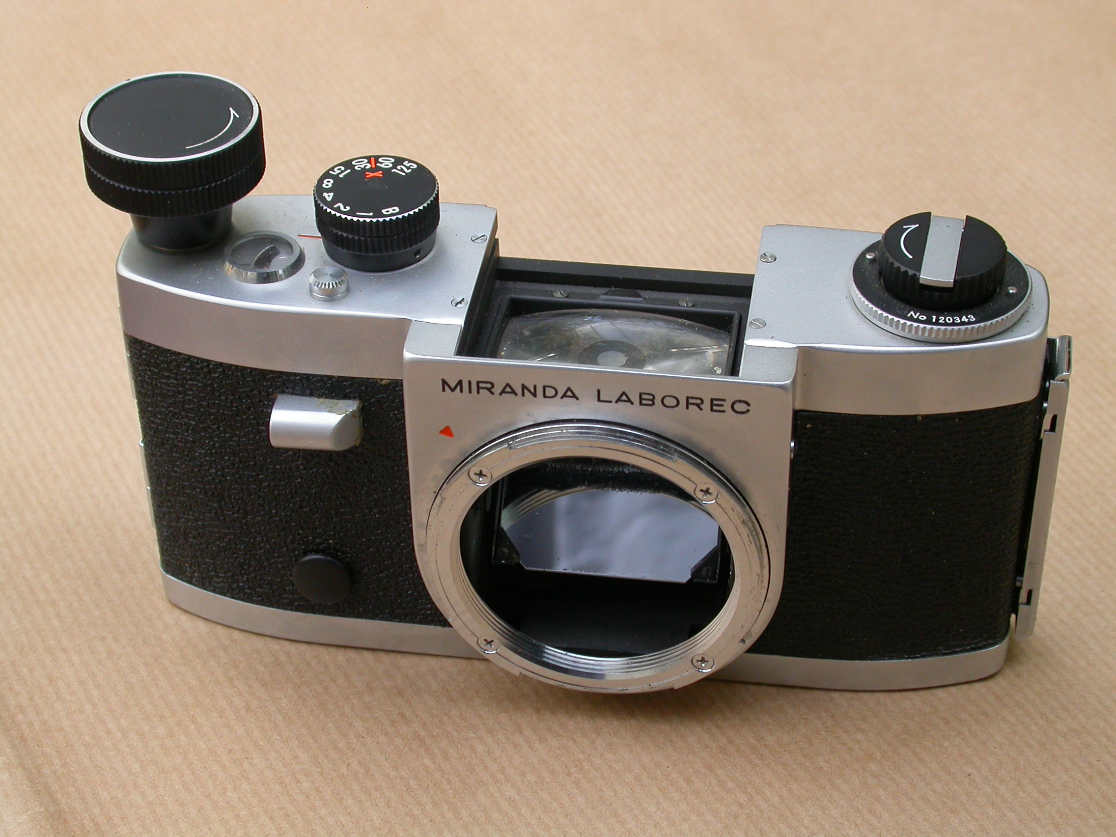 boîtier 24 x 36 Miranda Laborec destiné aux usages scientifiques et techniques